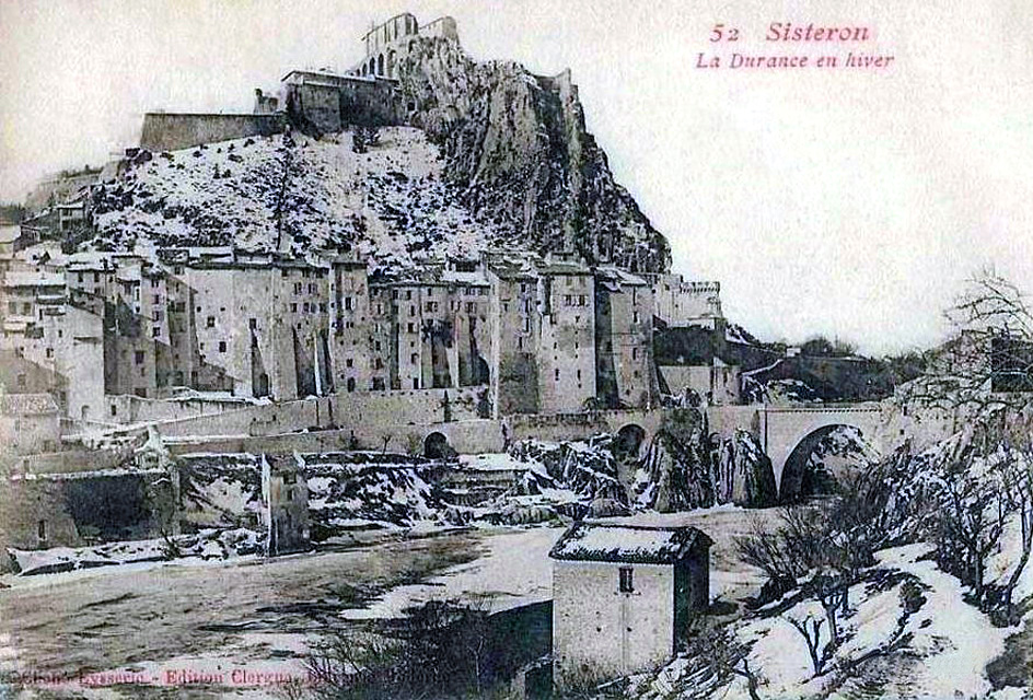 La Durance gelée et Sisteron sous la neige durant l'hiver 1907